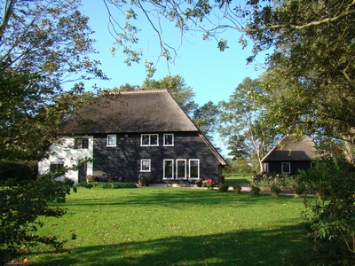 Farmhouse stroe